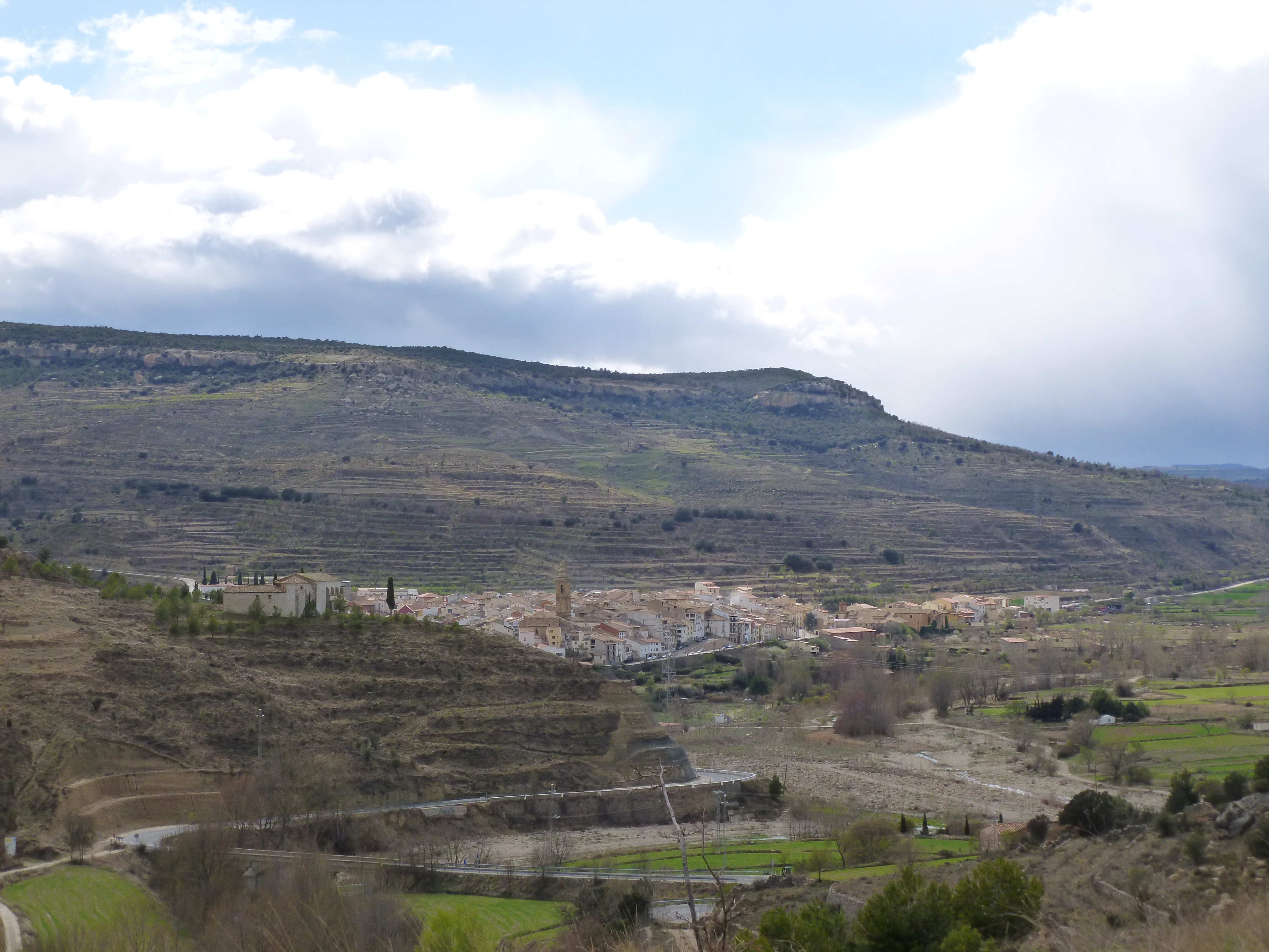 Río Bergantes y Forcall This is a photography of a Special Area of Conservation in Spain with the ID: ES5223029. Natura2000 entry, EEA entry